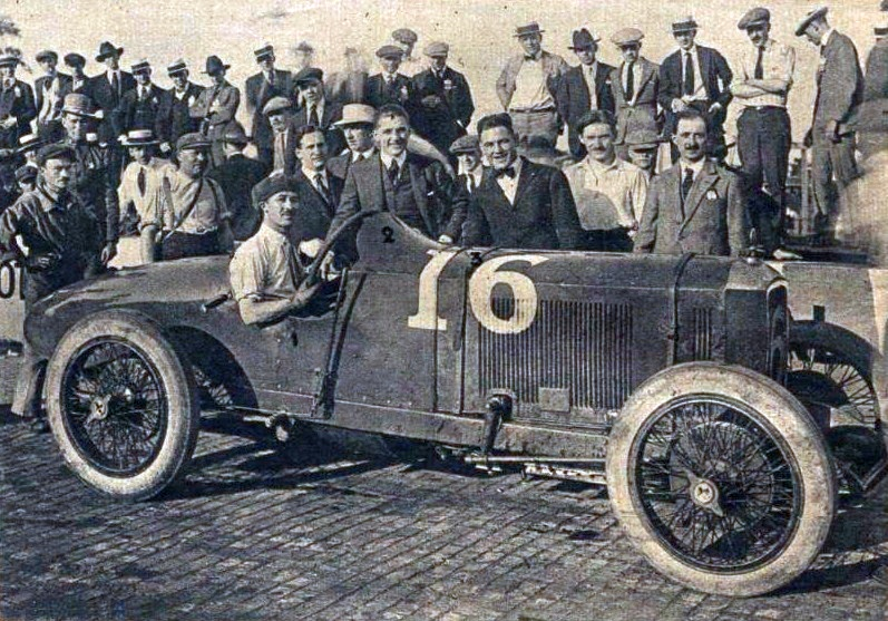 Georges Carpentier s'apprêtant à un tour d'honneur avec Jules Goux à Indianapolis en 1920 - Le Miroir des Sports du 29 juillet 1920, p.63 - "1" Goux, "2" Carpentier, and "3" François Descamps son manager, qui le repère dès l'âge de 9 ans...